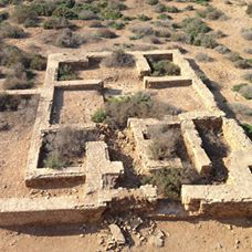 اساسات قصر الامارة واسط التاريخية